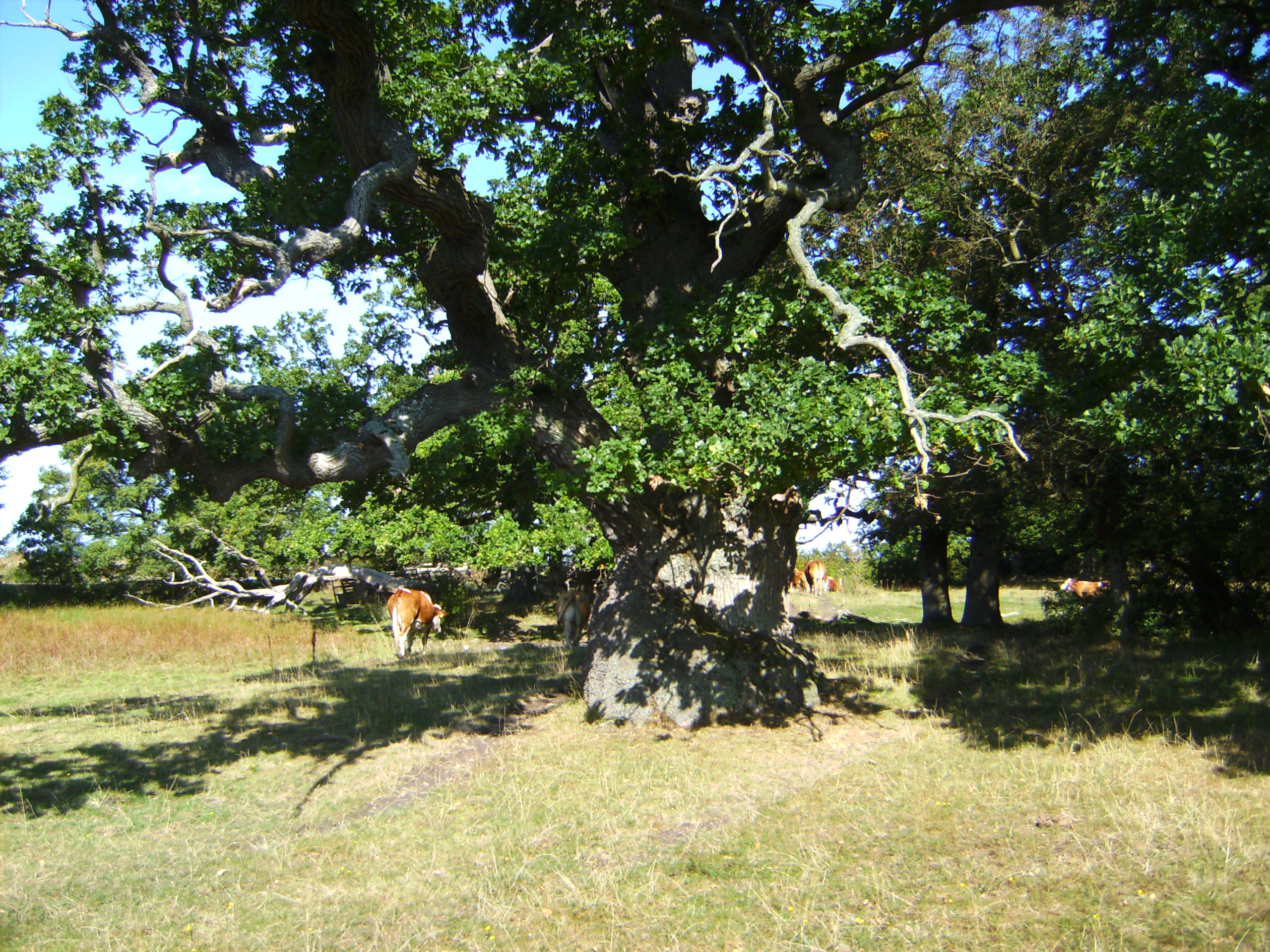 Motiver fra Skejten ved Fuglsang mellem Nysted og Nykøbing